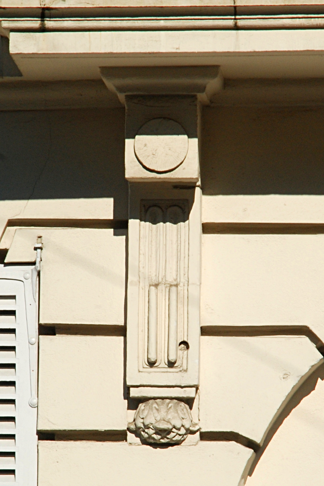 Belgique - Bruxelles - Hôtel Errera